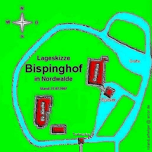 Lageskizze des Bispingshof in Nordwalde (Westf.)